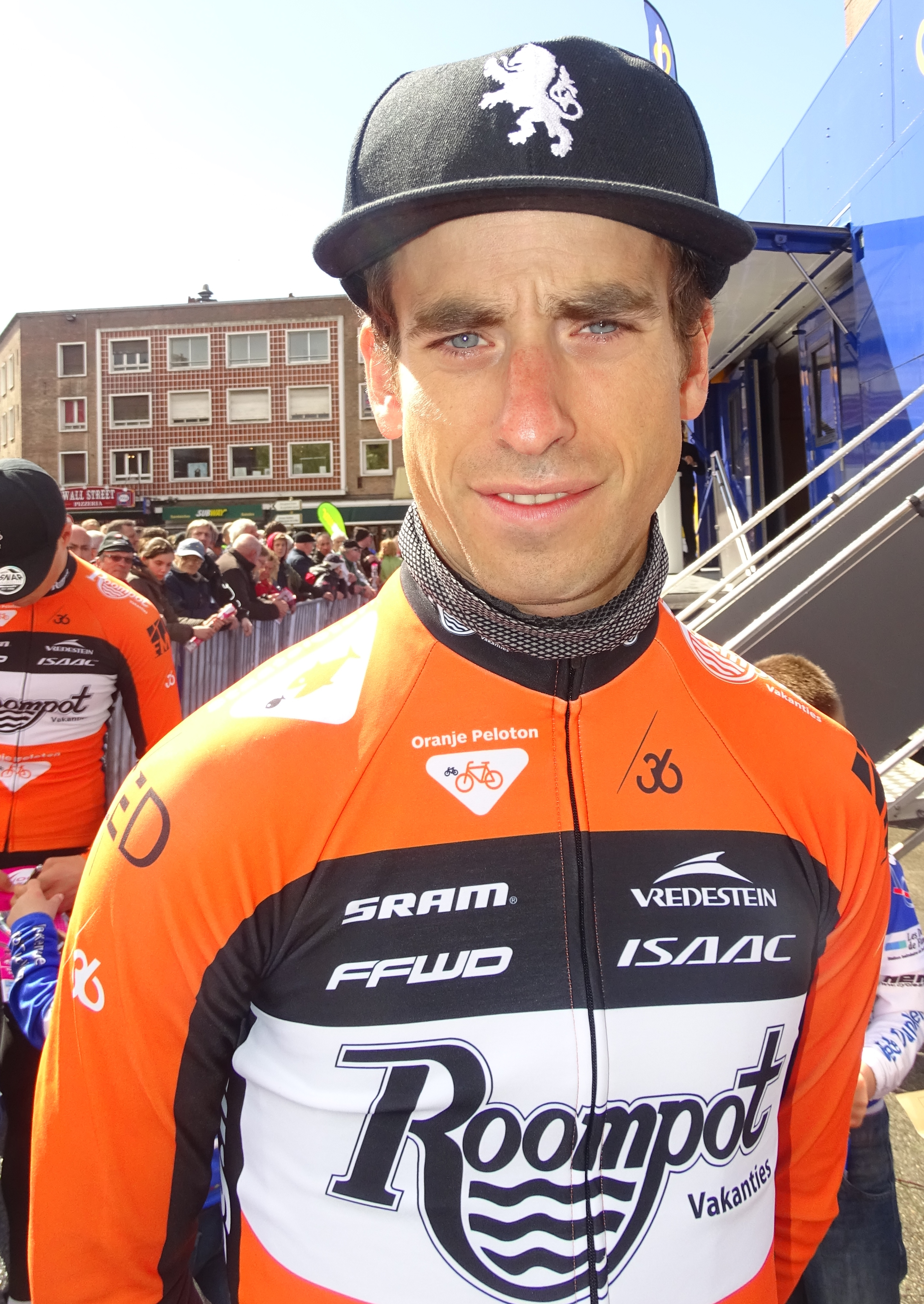 Reportage réalisé le mercredi 6 mai 2015 à l'occasion du départ de la première étape des Quatre jours de Dunkerque 2015 à Dunkerque, Nord, Nord-Pas-de-Calais, France. Depicted person: Reinier Honig Depicted team: Roompot